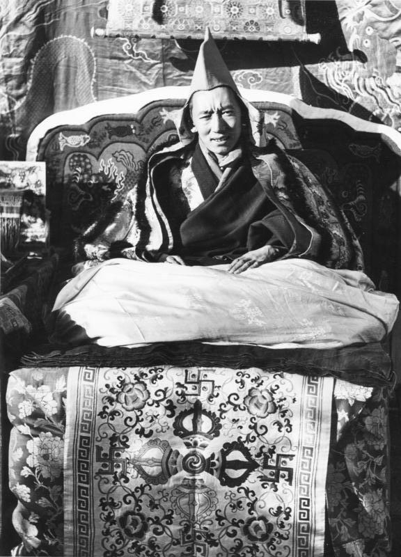 Tibetexpedition, Regent von Tibet Lhasa, Regent [Reting Rimpoche / Reting Rinpoche auf Thron]